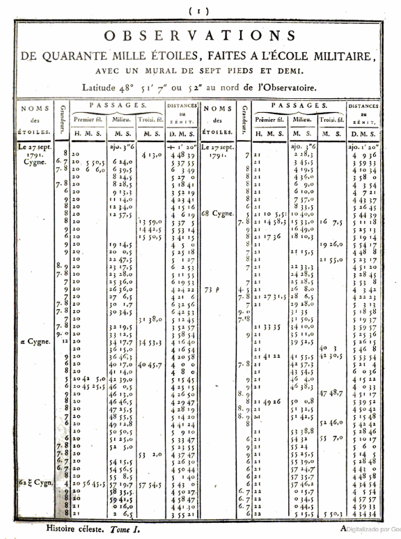 Título Histoire céleste française, Volumen 1 Histoire céleste française, Joseph Jérôme Le Français de Lalande Autor Joseph Jérôme Le Français de Lalande Editor Imprimerie de la république, 1801 Procedencia del original Princeton University Digitalizado 23 Ene 2009 N.º de páginas 590 páginas